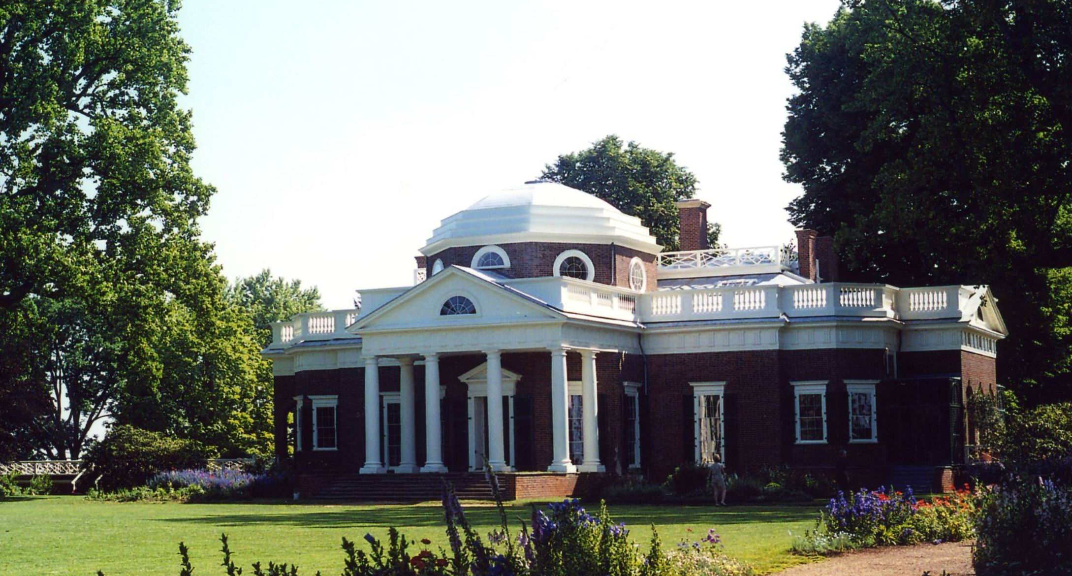 Jeffersons Landsitz Monticello, Virginia